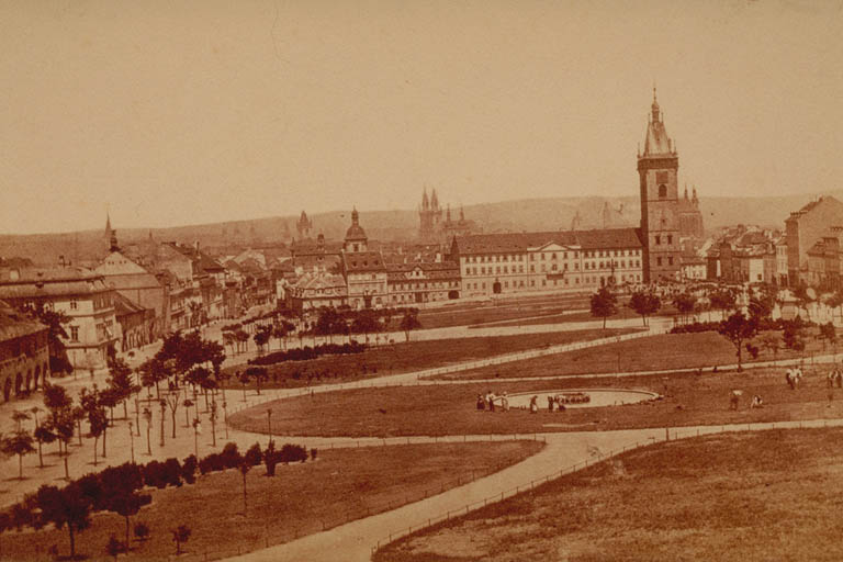 Praha, Karlovo náměstí